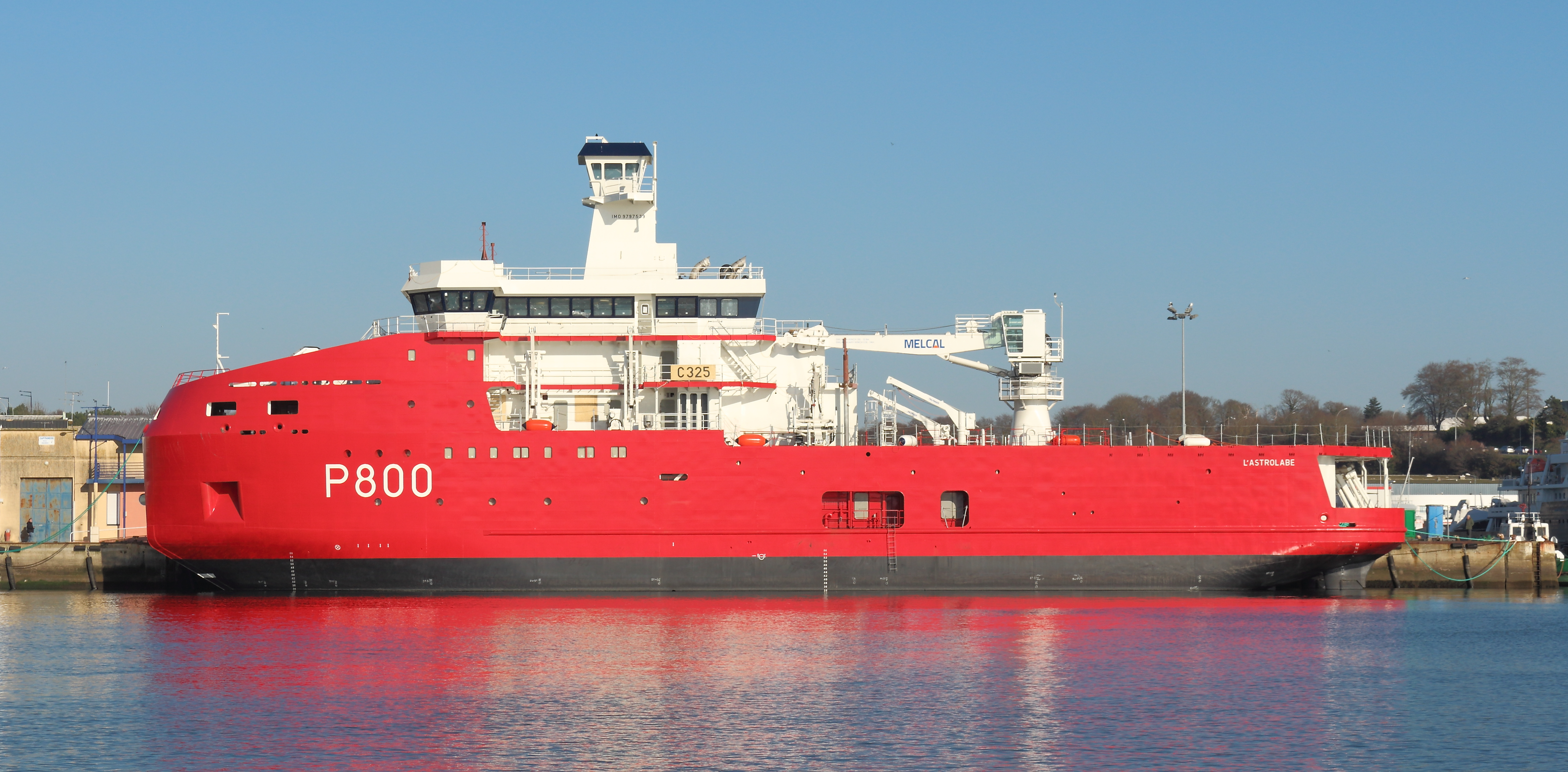 Le navire polaire L'Astrolabe en attente d'armement dans le port de Concarneau, Finistère, Bretagne, France.